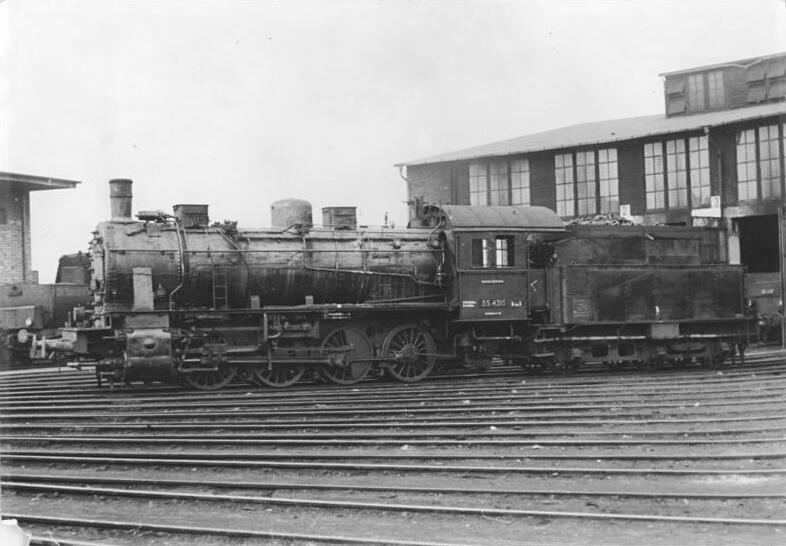 Dampflok 55 4315 (BR 55) Zentralbild Schmidtke 7.8.1952 Lokomotivtypen der Deutschen Reichsbahn. UBz: Baureihe 55